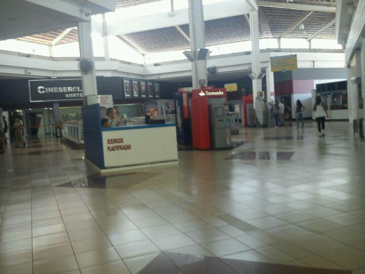 Área externa do Cinesercla Norte Shopping de Belo Horizonte, MG